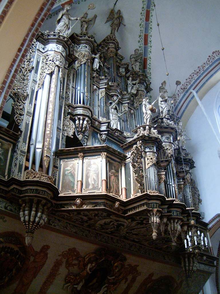 Kamień Pomorski - Organy w katedrze